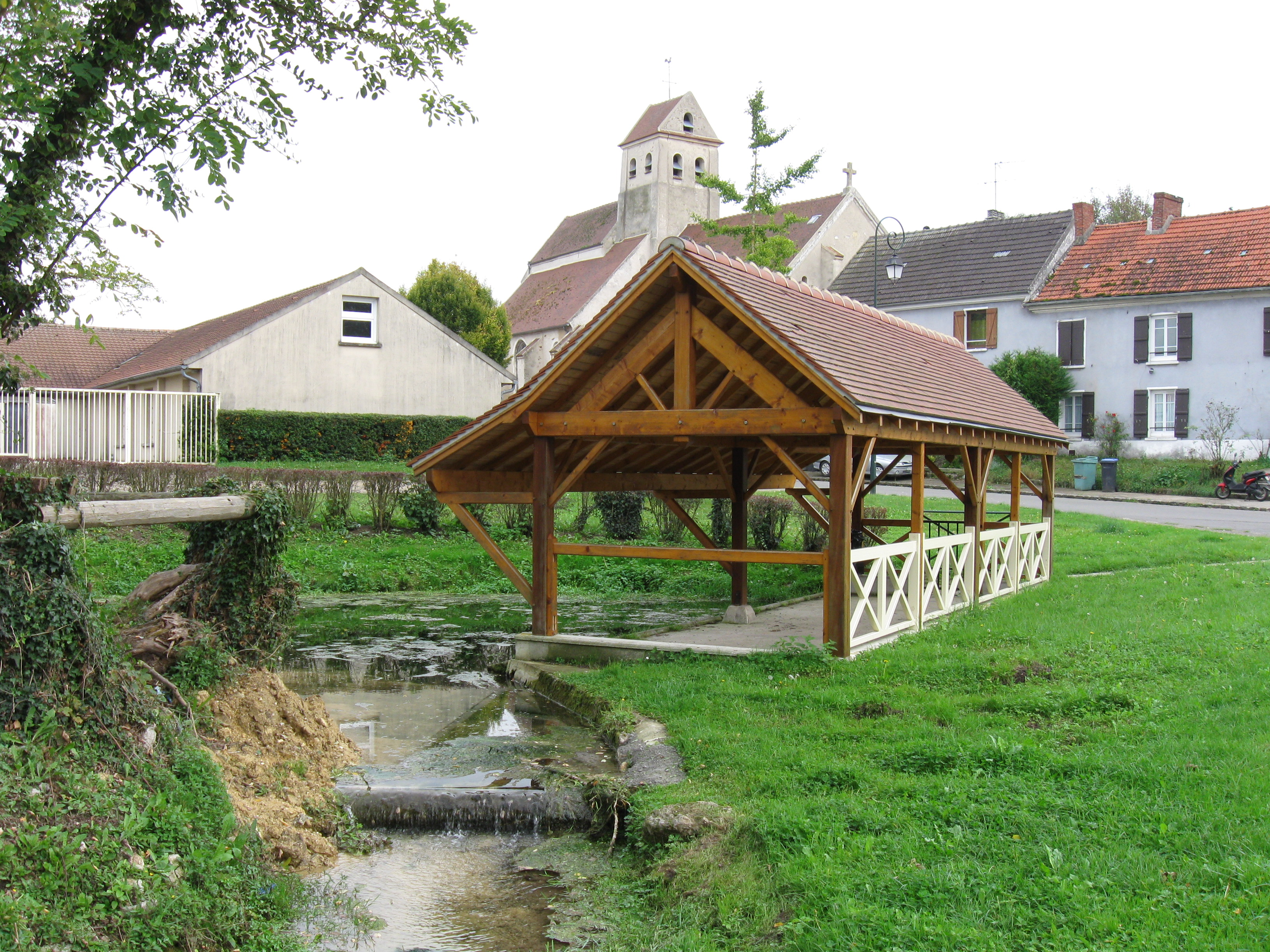 Le village et l'ancien lavoir de Vinantes. (Seine-et-Marne, région Île-de-France).